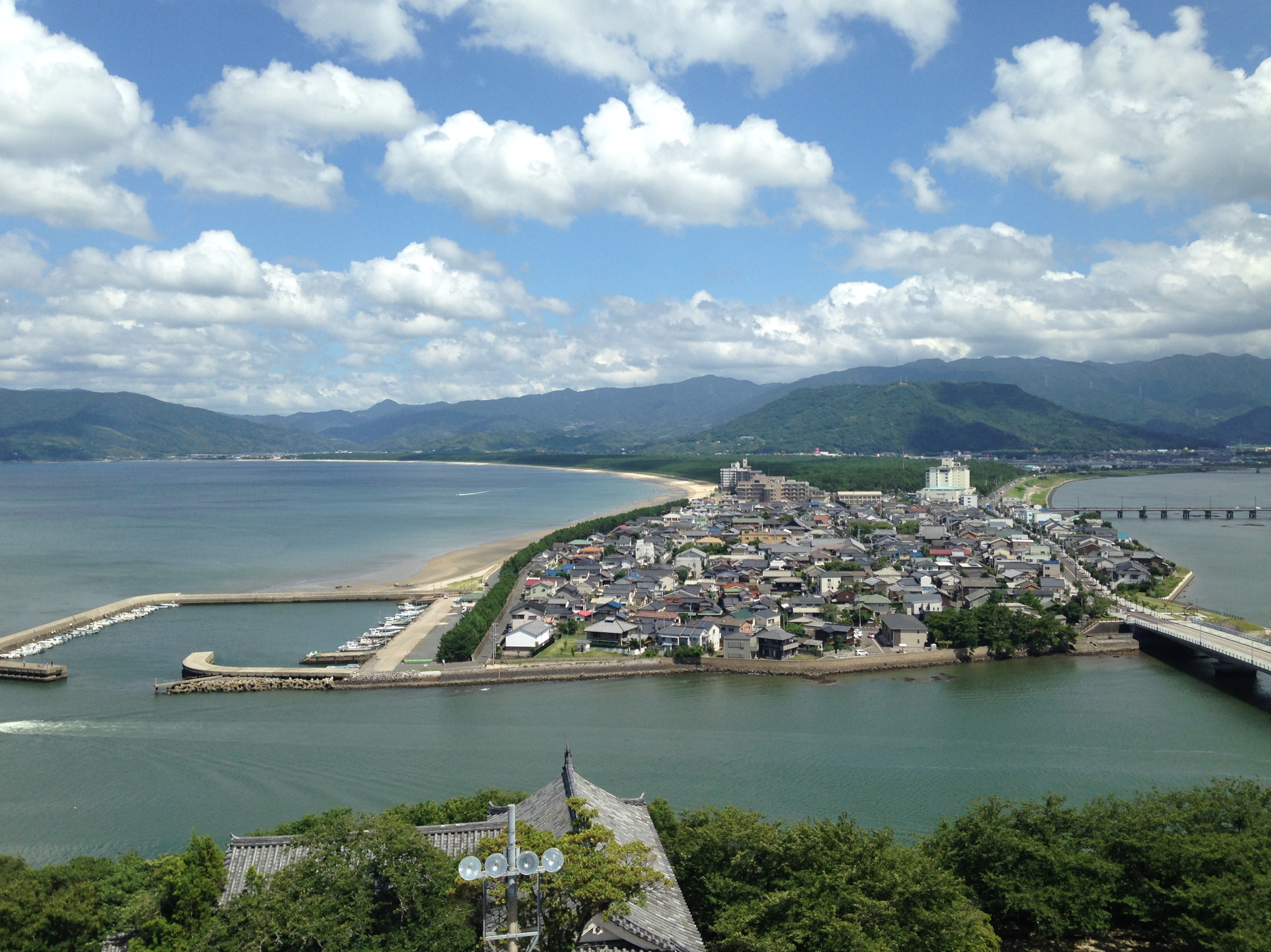 唐津城天守閣からの眺め(虹ノ松原・鏡山方面)